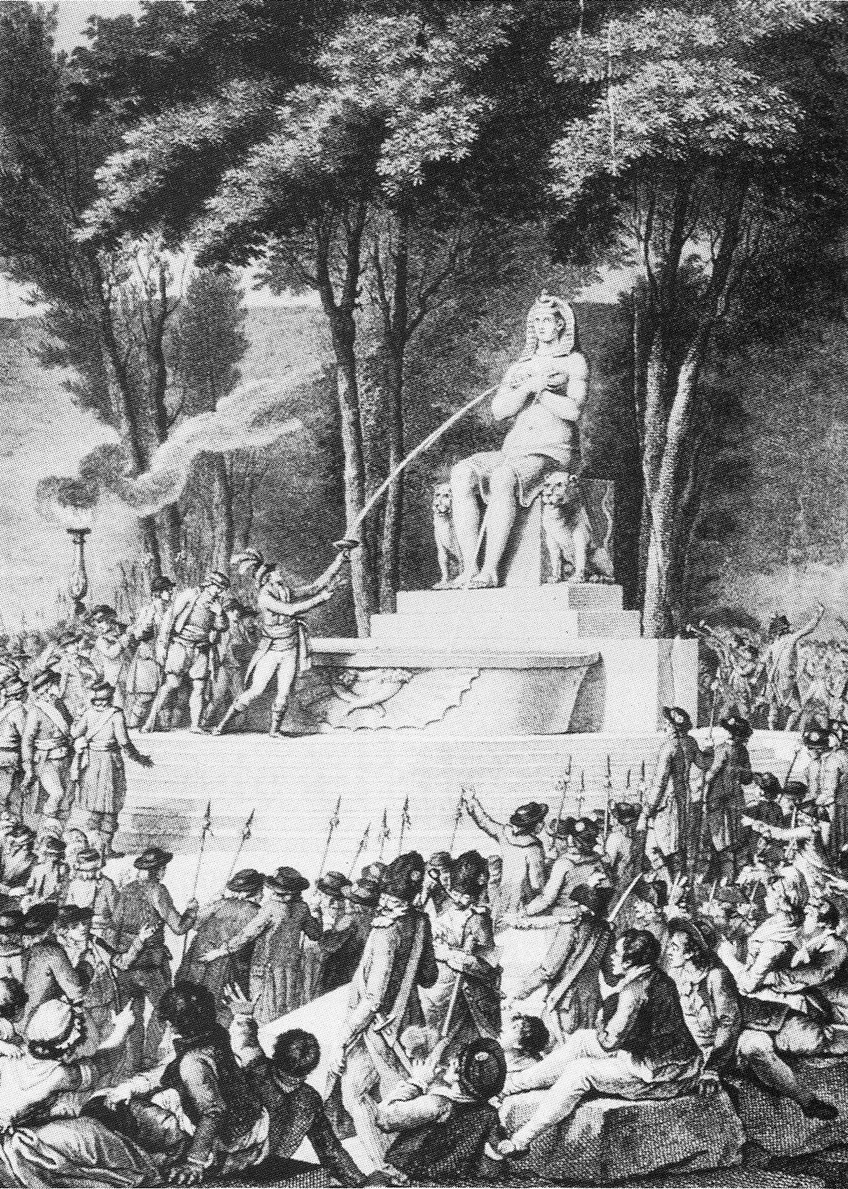 Gravure de ou d'après Charles Monnet représentant la fontaine de la Régénération, érigée le 10 août 1793 sur la place de la Bastille. Plâtre bronzé, projet de Louis David. Détruite vers 1798. Musée de la Légion d'Honneur